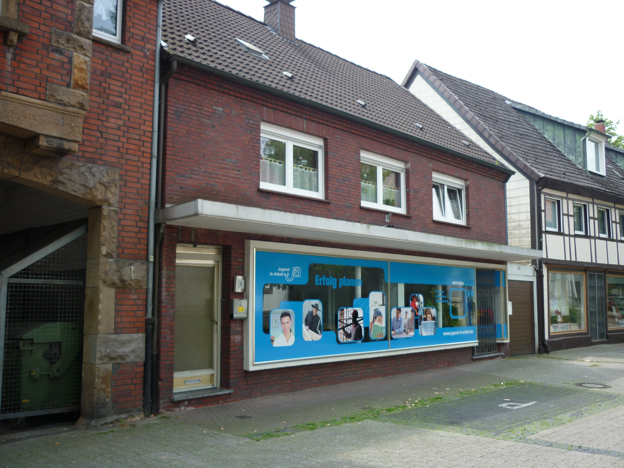 Stolpersteinlage Datteln Marktstraße 5